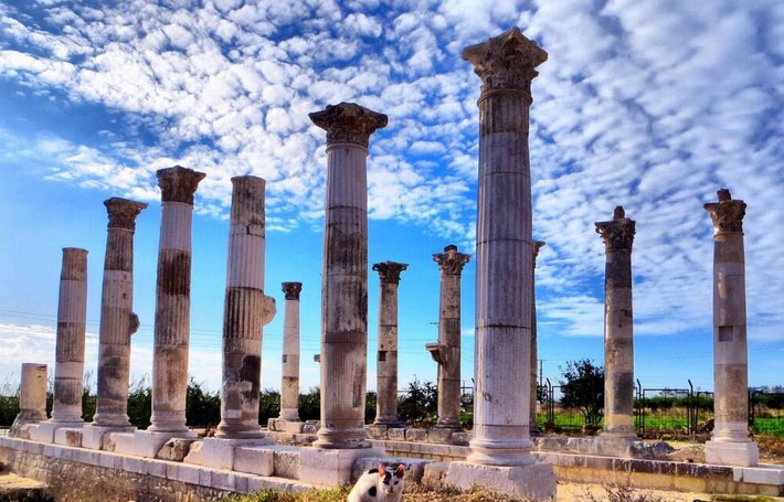 Soli Pompeipolis antik kent